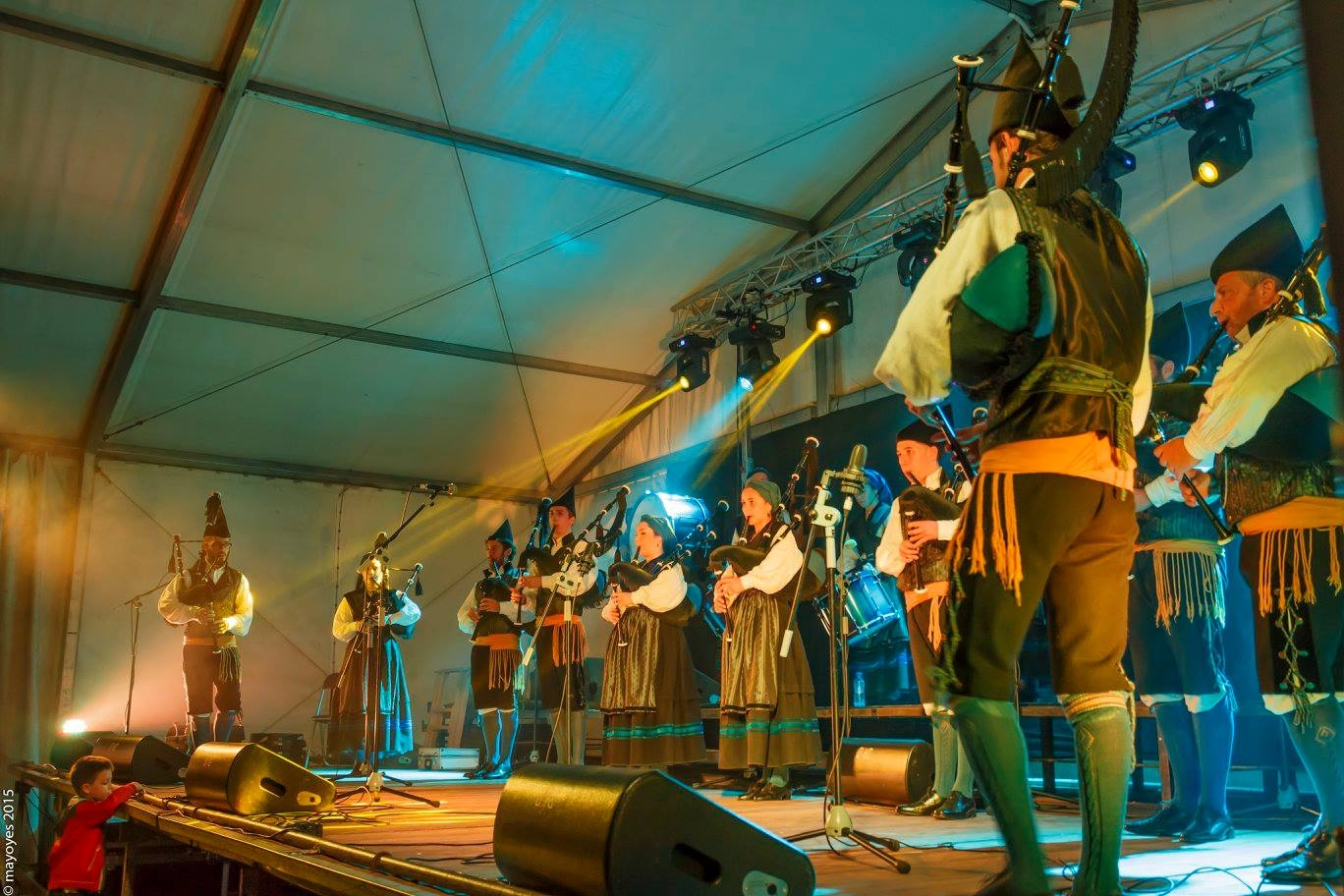 Banda de Gaites Ribeseya nel so Festival